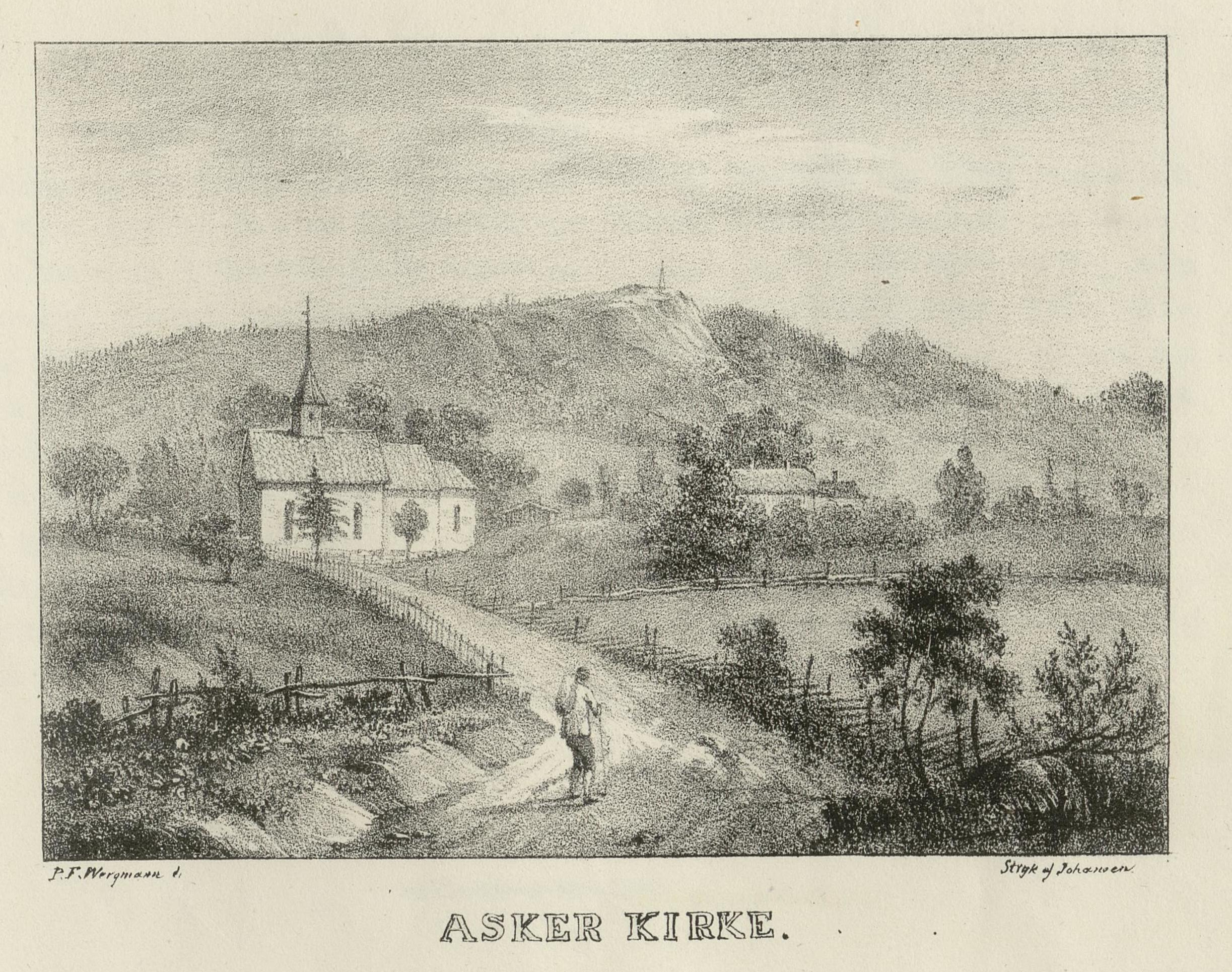 Illustrasjon hentet fra boken "Norge, fremstillet i lithographerede Billeder efter Naturen" av Wergmann, P.F. og utgitt av P.F. Wergmann (Christiania, 1836-1837)